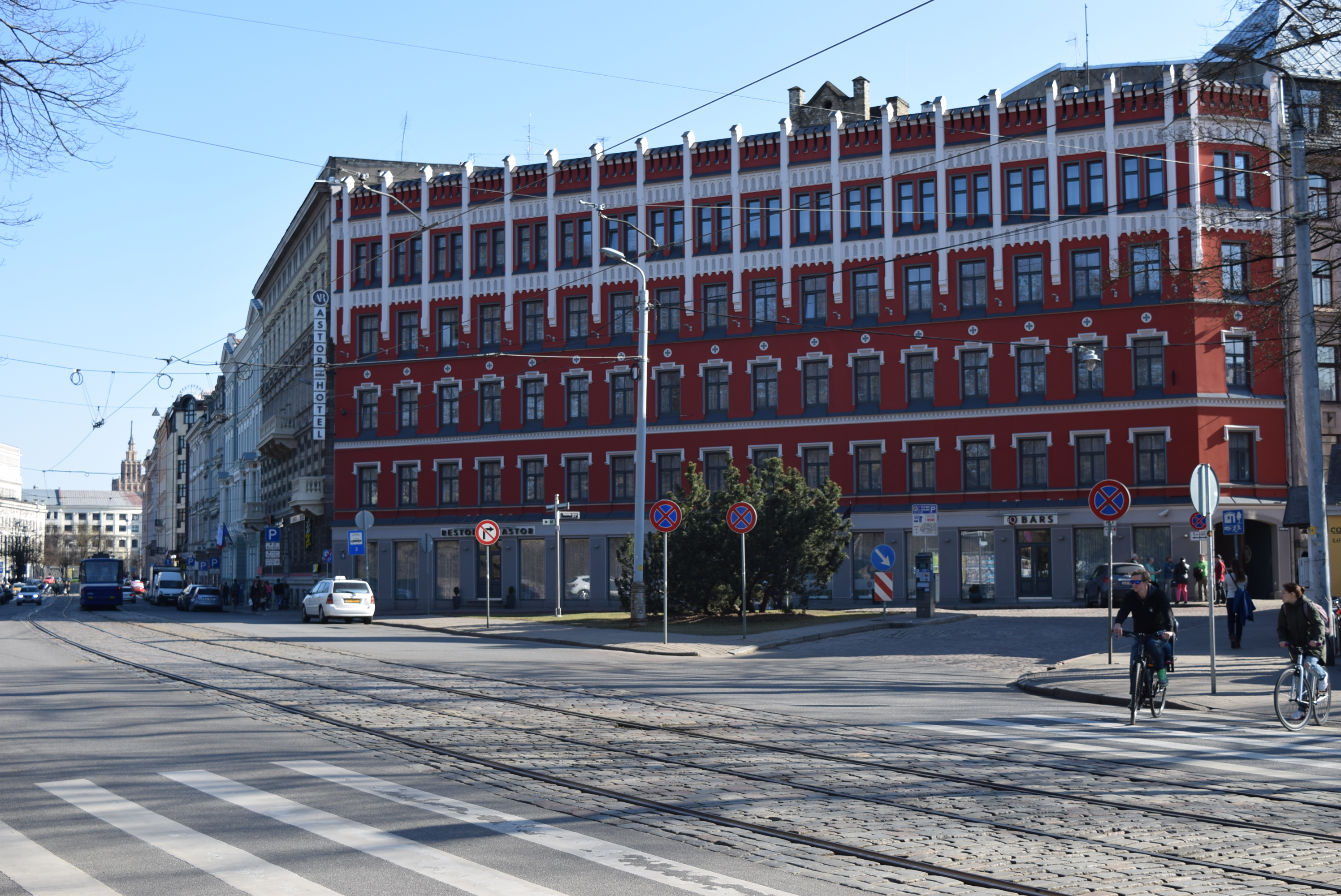 Vecrīga, Central District, Riga, LV-1050, Latvia